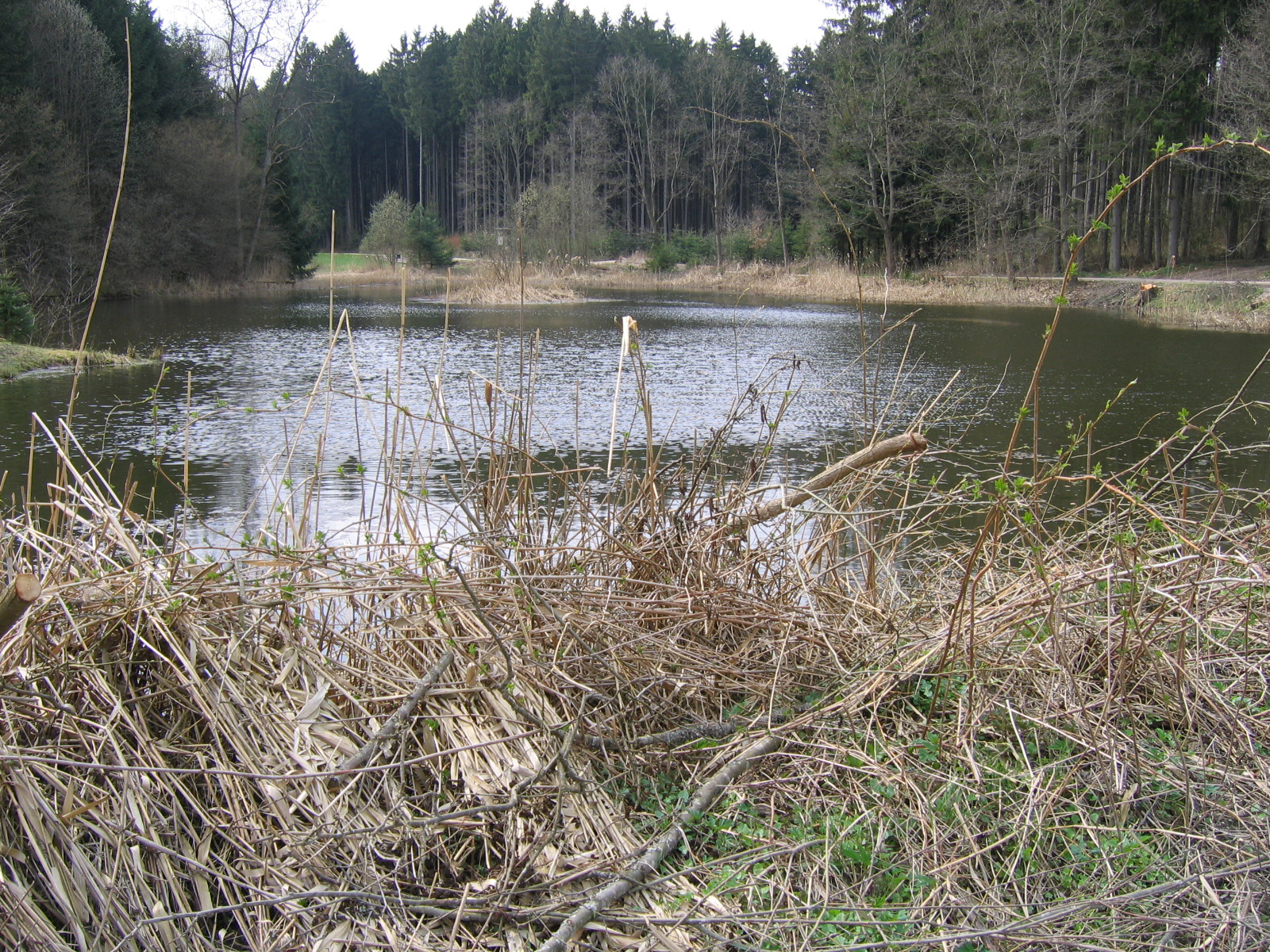 Der Forsthofweiher ist eine Idylle